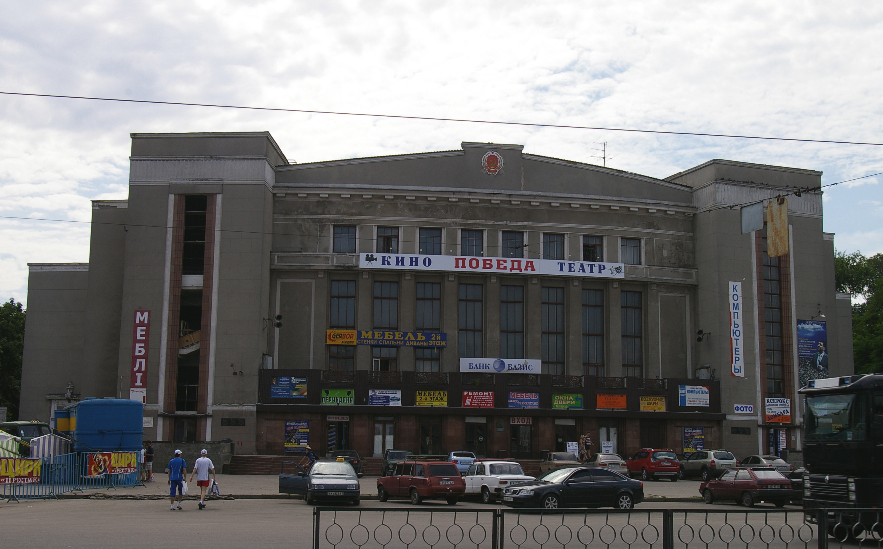 Харьков